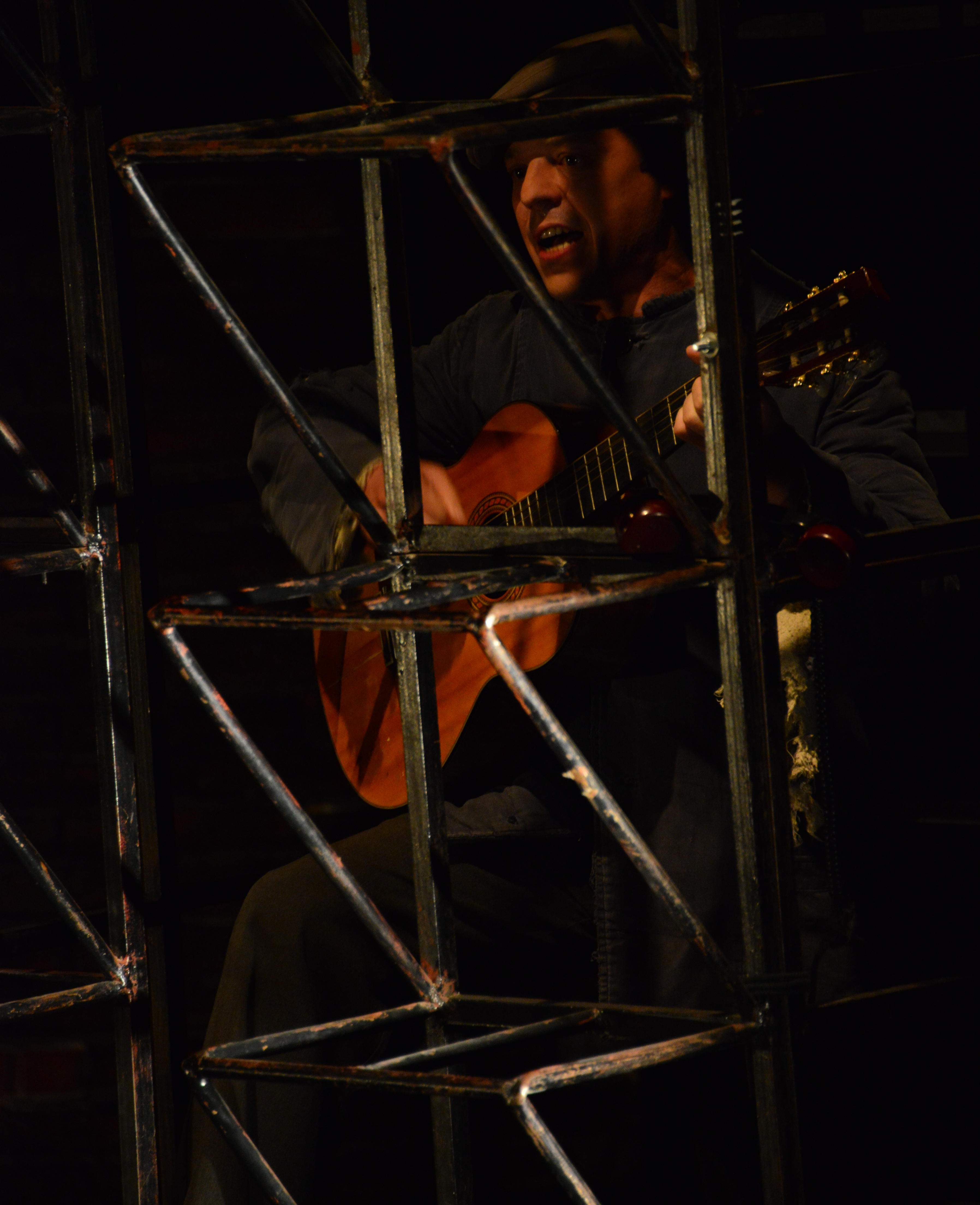 Спектакль «Роман о девочках» на сцене театра «У Никитских ворот» 08.10.2017